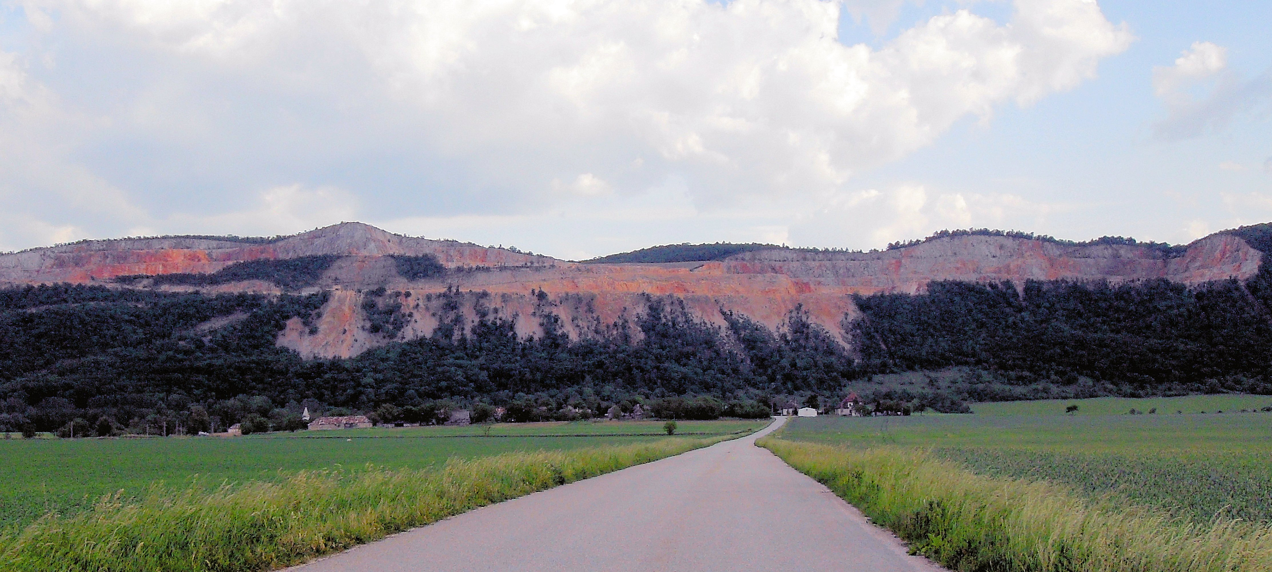 Pohľad na_juh a strmé steny na Včelára